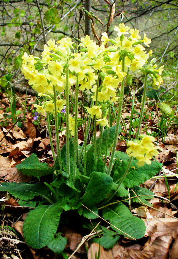 Primula elatior, Hohe Schluesselblume, Fischbach, Baden-Württemberg